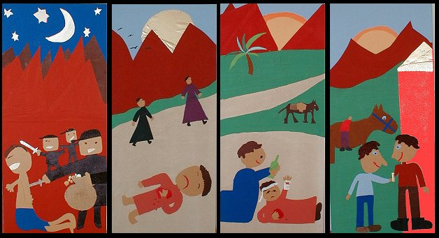 Enghave Kirke, Børnealtertavle:Den barmhjertige Samaritaner